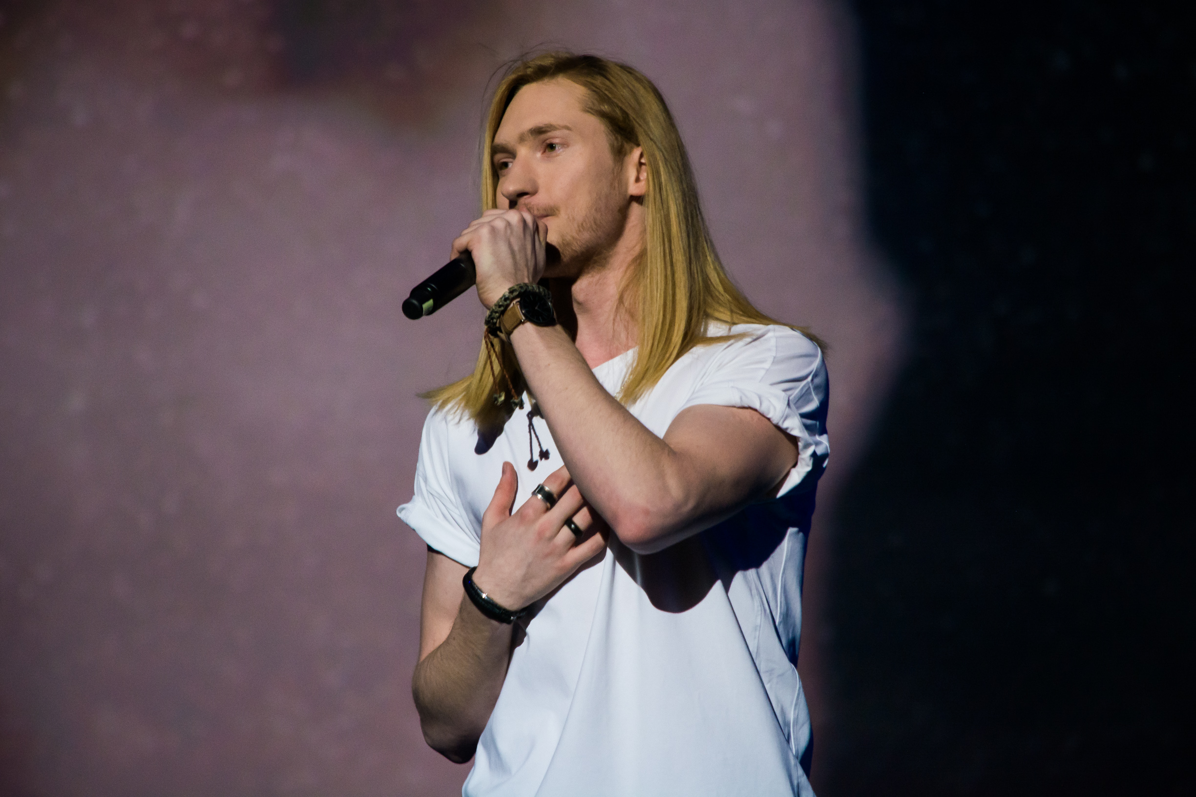 Александр Иванов (Ivan) на концерте Новые Дети (26.03.2017)